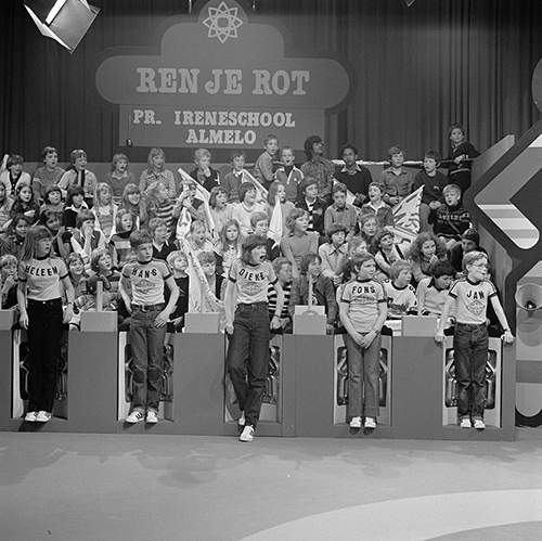 Kandidaten van de Prinses Ireneschool in Almere aan Ren je rot in 1980